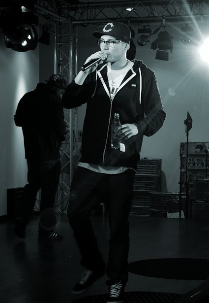 Polish rapper Pezet